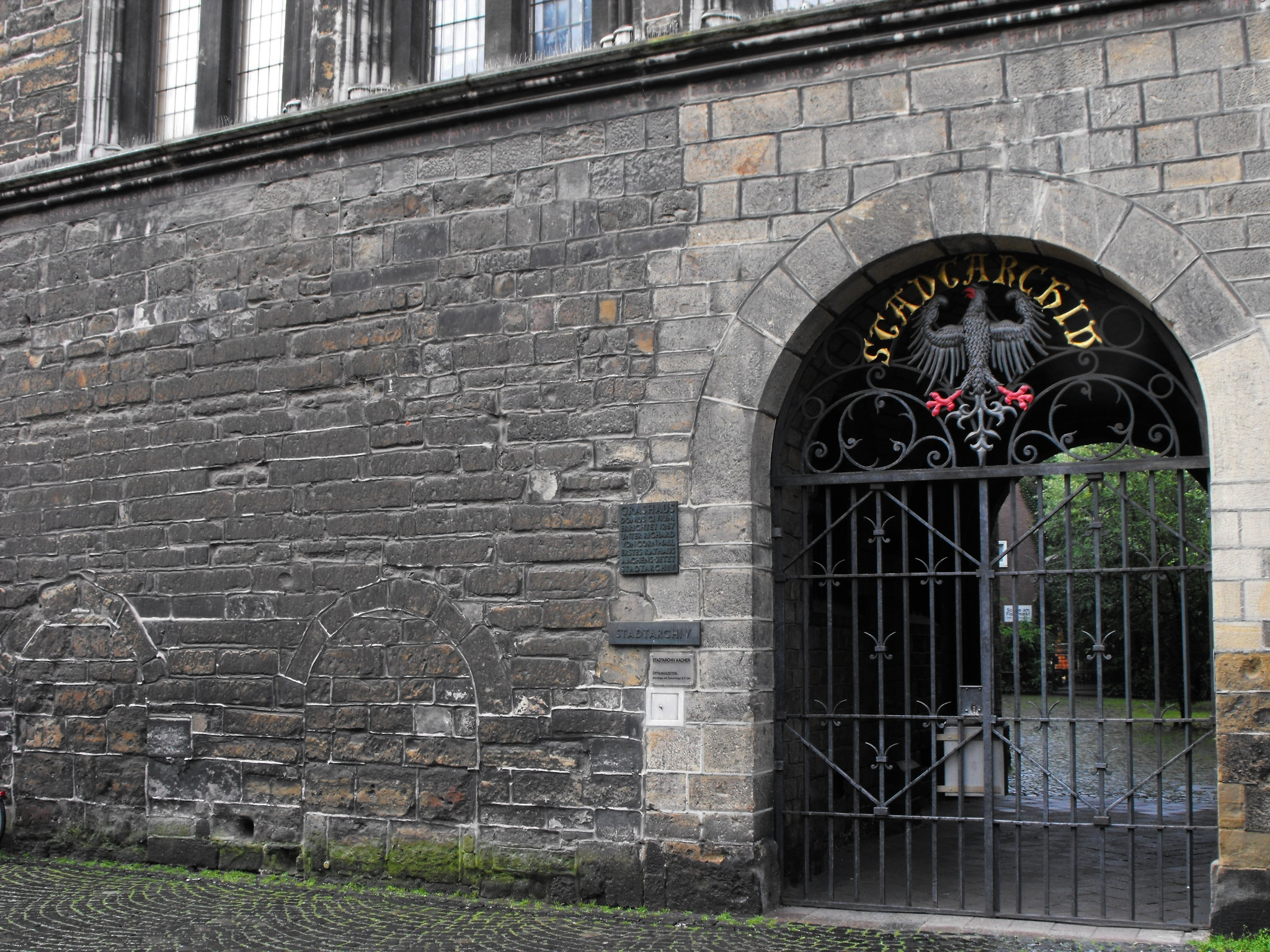 Das "Grashaus" - Eingang des Stadtarchivs